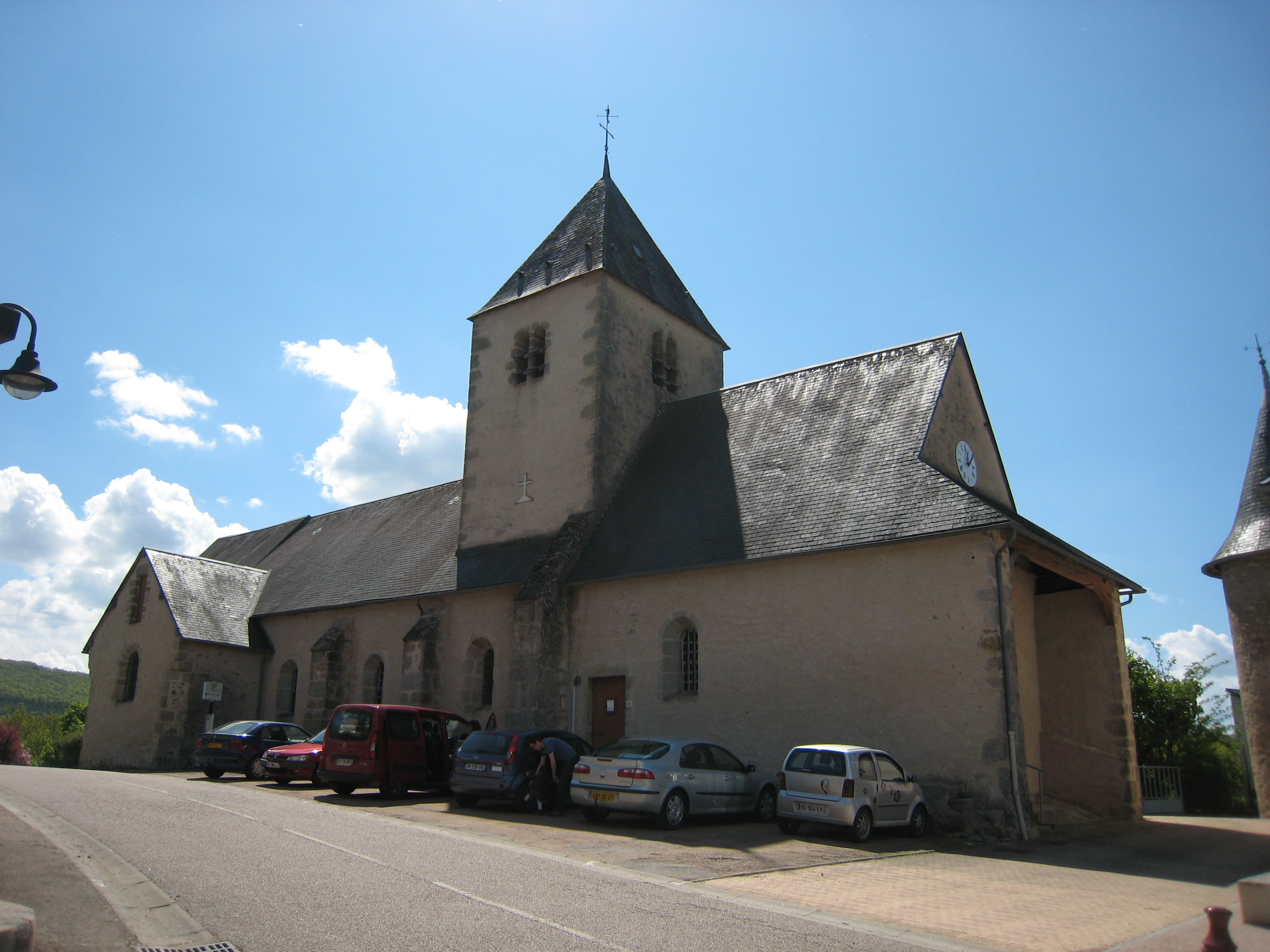 Église Saint-Pierre de Chaumard